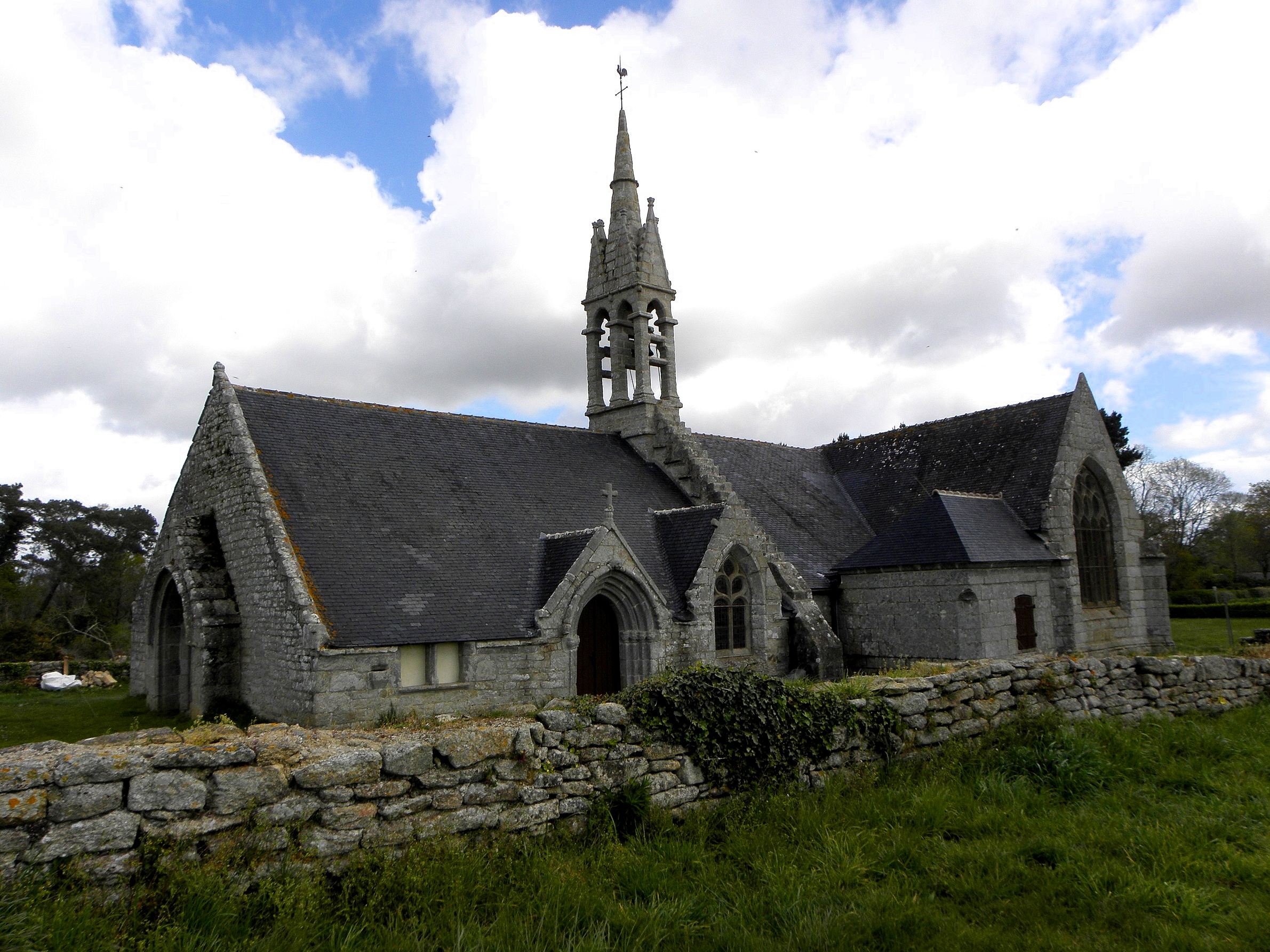 Chapelle Notre-Dame-de-Tréminou en Plomeur (29). Façade occidentale et flanc sud.